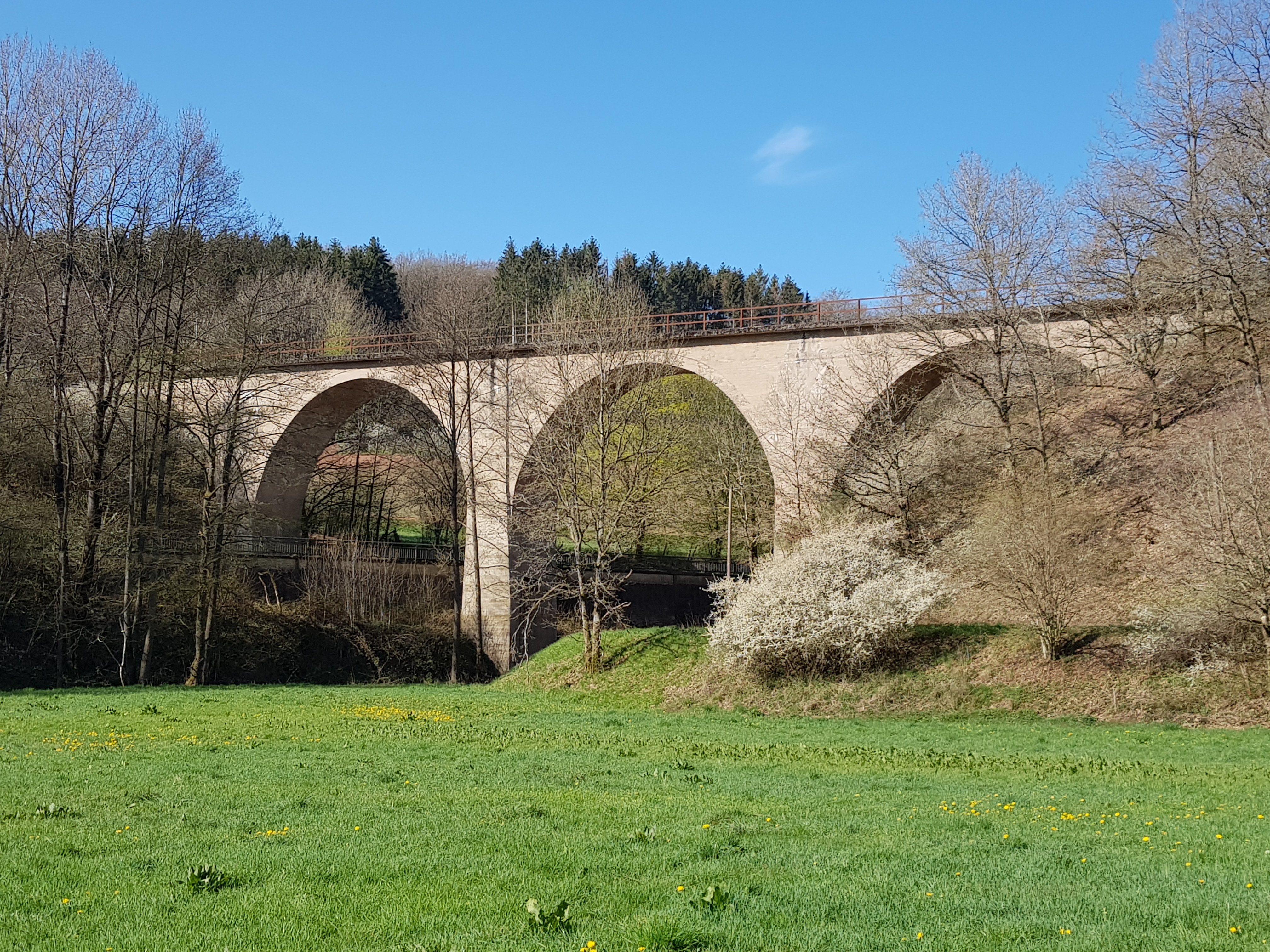 Blick von der ehem. Bahnlinie nach Waxweiler in das Bierbachtal mit dem Viadukt.